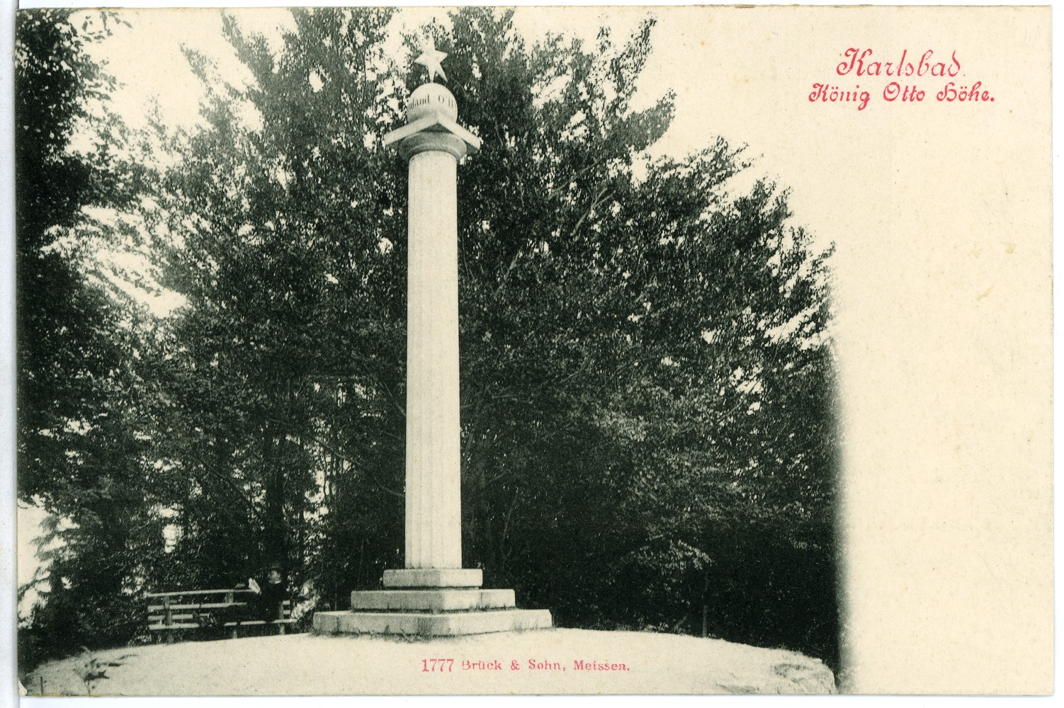 Karlsbad; König Otto Höhe This postcard is from publisher Brück & Sohn in Meißen ( postcard has a unique number 01777 and is available in a higher resolution at the publisher. This images was uploaded in a cooperation project between Wikipedians and the publisher.